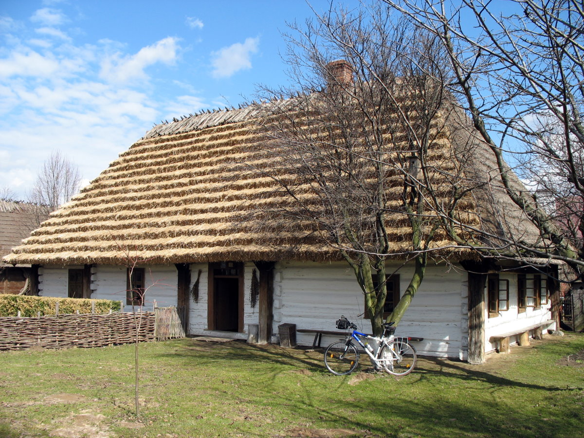 Muzeum Wsi Markowa (Polska) - chata przysłupowa z 1874 r.